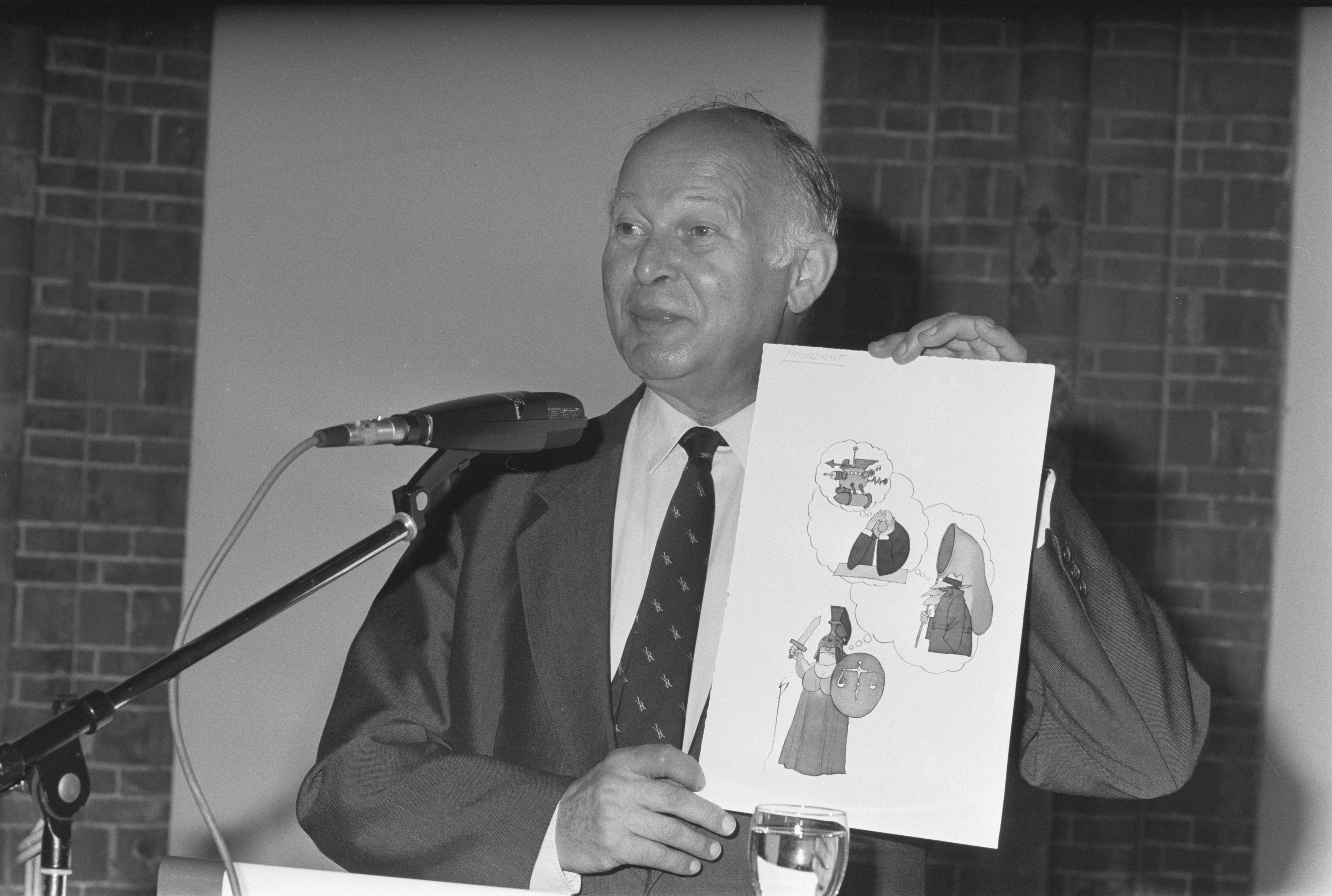 Theo Olof veilt een tekening tijdens de perspremière van de Nederlandse film "Van Geluk Gesproken".Collectie / Archief : Fotocollectie Anefo Reportage / Serie : [ onbekend ] Beschrijving : Regisseur Pieter Verhoeff en schrijfster Marijke Howeler na perspremiere "van geluk gesproken"; pres. Fonds Victor Hugo ; Theo Olof veilt tekening Datum : 17 november 1987 Trefwoorden : Regisseurs, premieres, schrijfsters, tekeningen Persoonsnaam : Olof, Theo, Verhoeff, Pieter Fotograaf : Bogaerts, Rob / Anefo Auteursrechthebbende : Nationaal Archief Materiaalsoort : Negatief (zwart/wit) Nummer archiefinventaris : bekijk toegang 2.24.01.05 Bestanddeelnummer : 934-1313